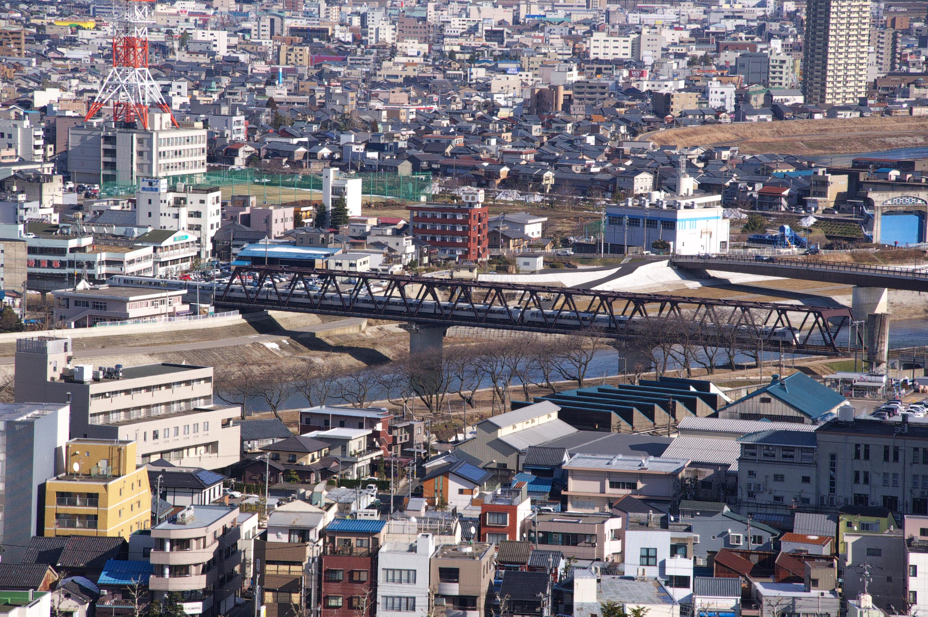 福井市中心市街地（足羽川と電車）